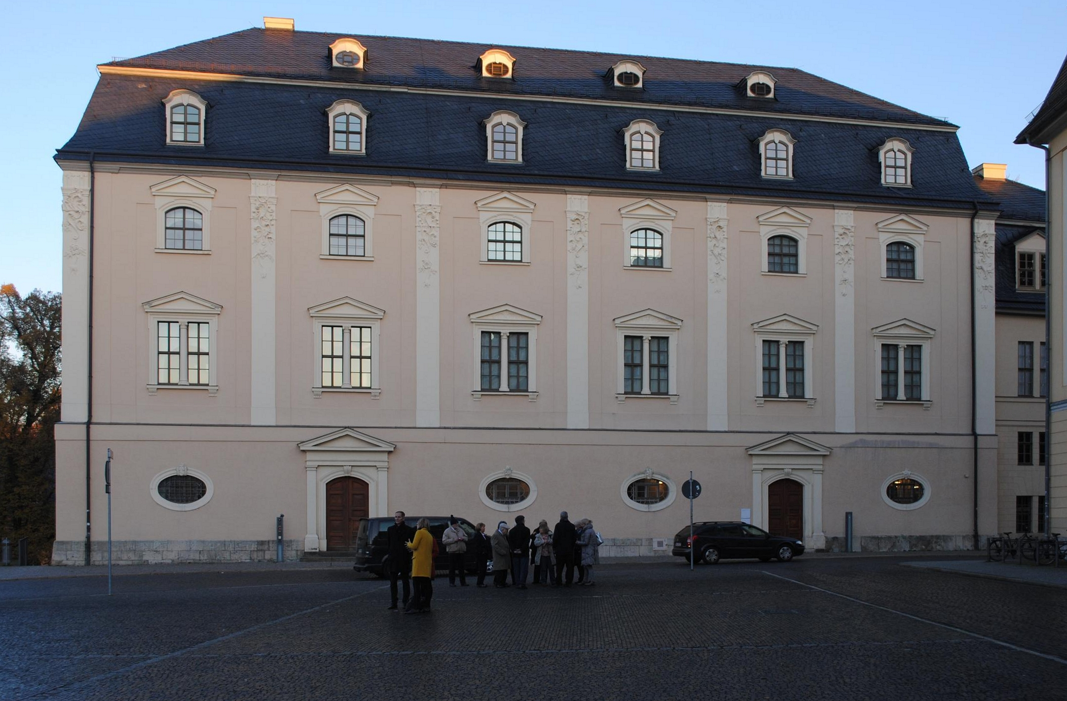 Anna Amalia Bibliothek 2015